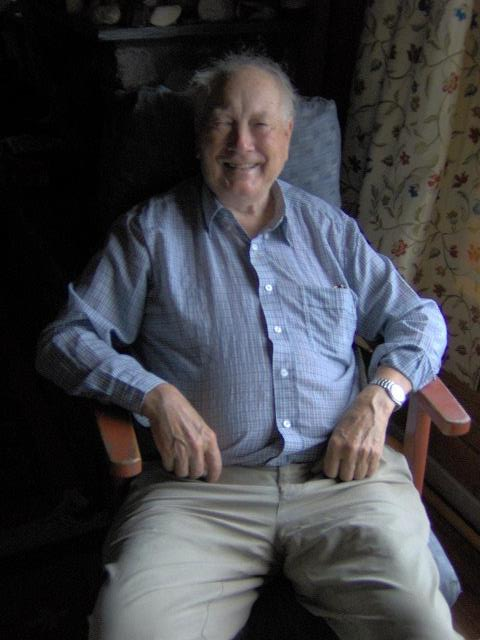 Bjørn Grothaug Andersen (født 23. mars 1924 i Stavanger, død 12. januar 2012), norsk professor i kvartærgeologi.